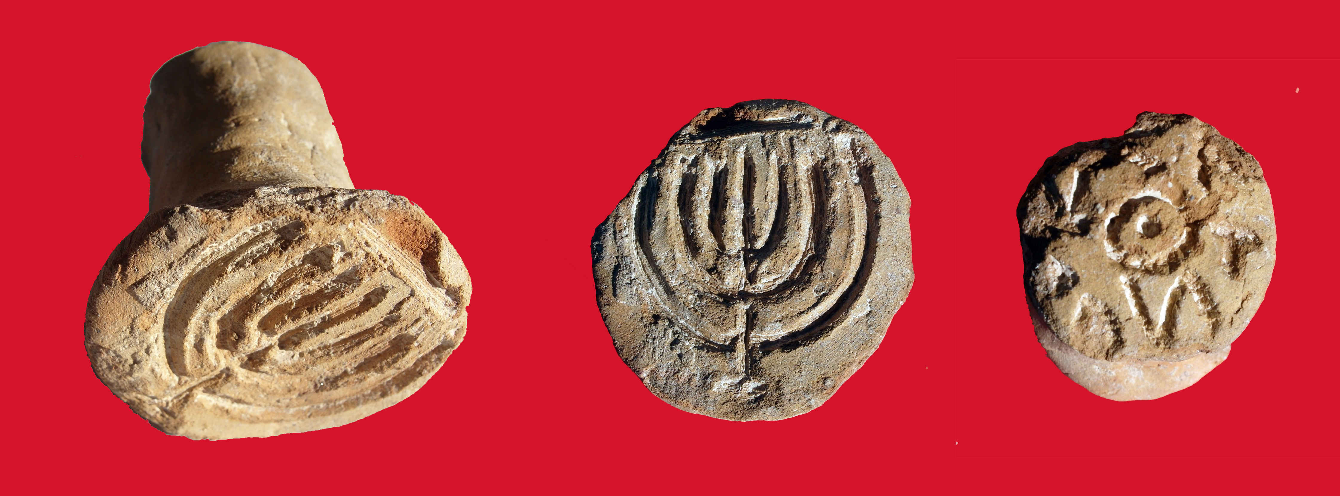 חורבת עוצה - חותם ללחם שבחזיתו חרוטה מנורת שבעת הקנים נמצא בשטח E שבדרום האתר צילם דני שיאון.